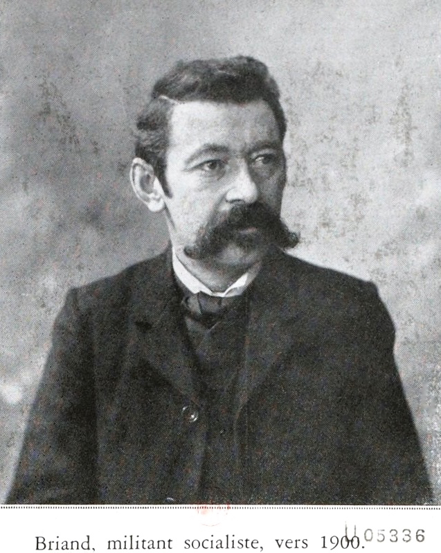 Aristide Briand, militant socialiste, vers 1893.